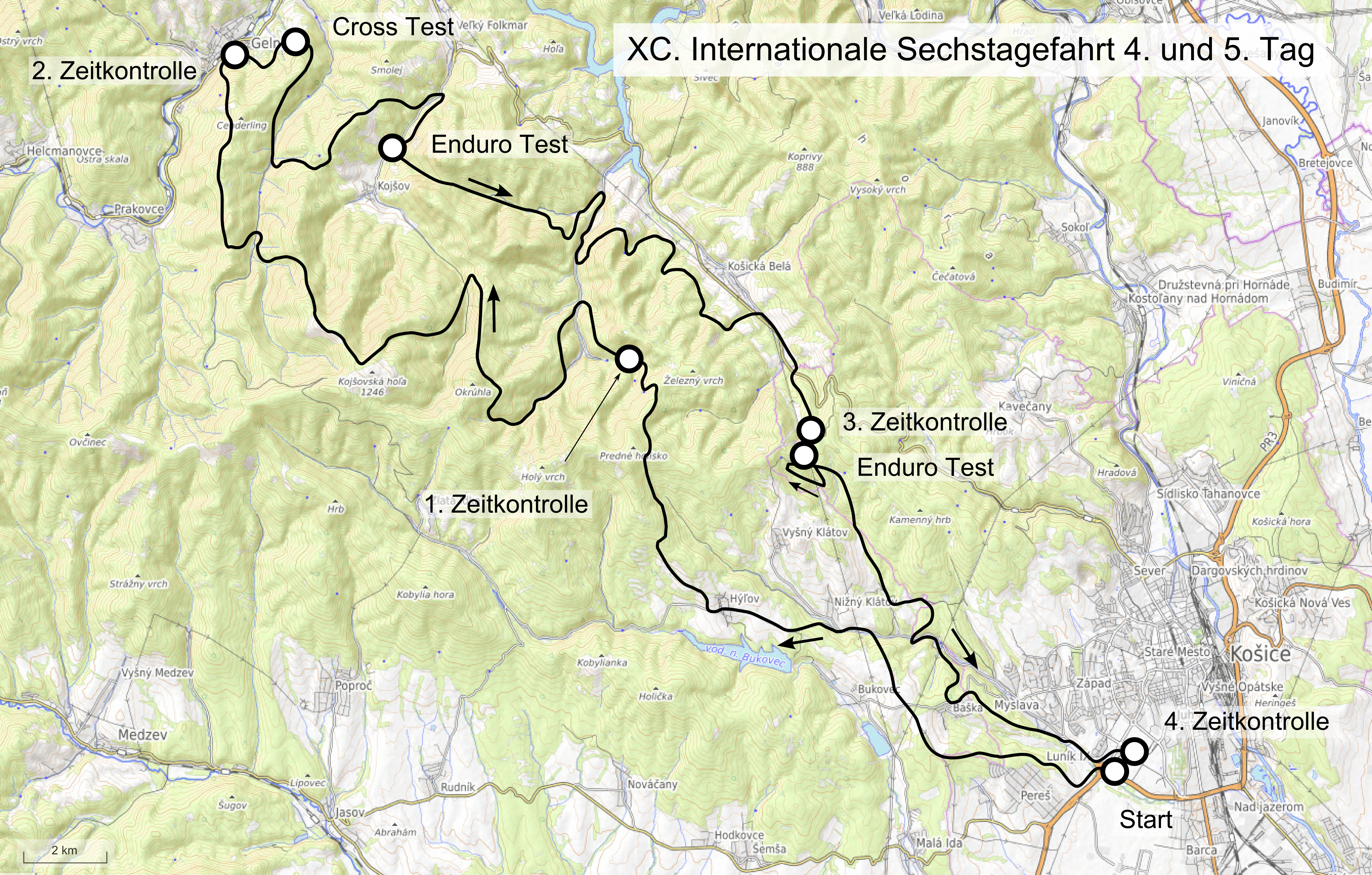 Karte der 90. Internationale Sechstagefahrt, Route des 4. und des 5. Tages